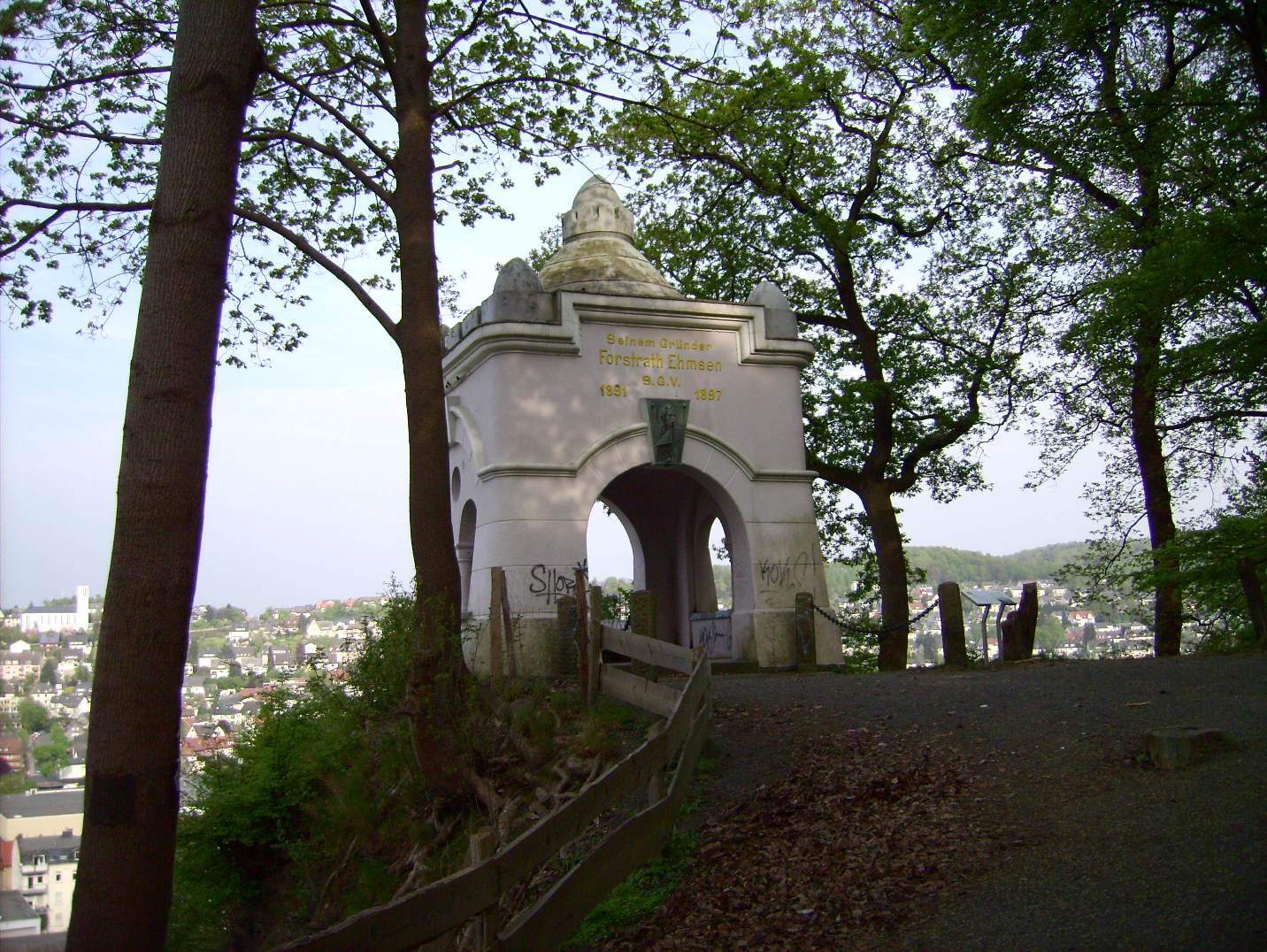 Ehmsendenkmal Arnsberg